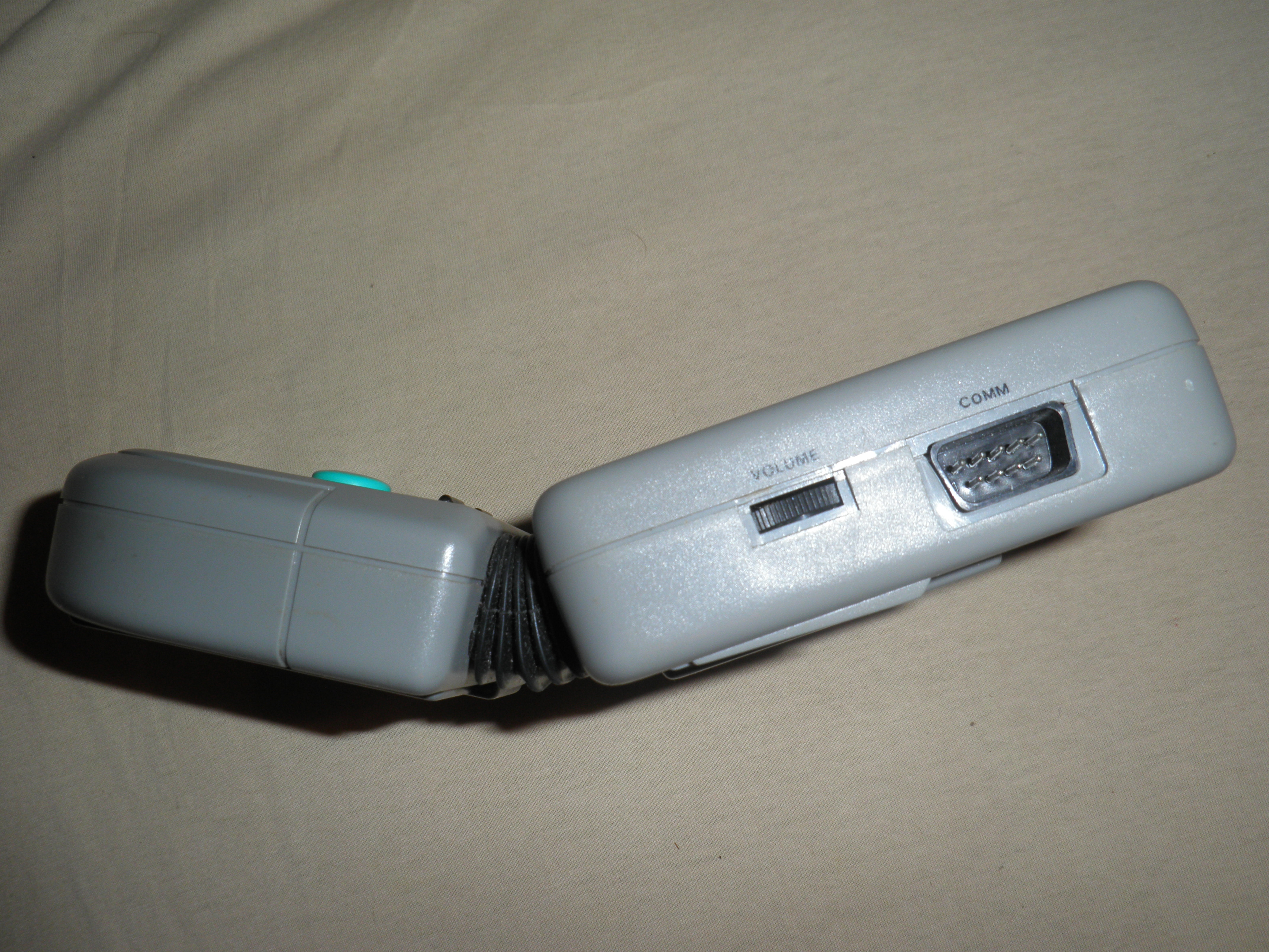 Портативная игровая консоль Watara Supervision